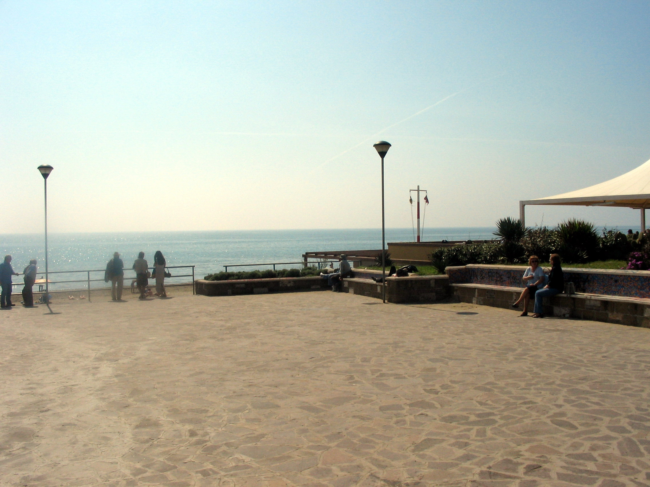 Torvaianica, Pomezia, Italia